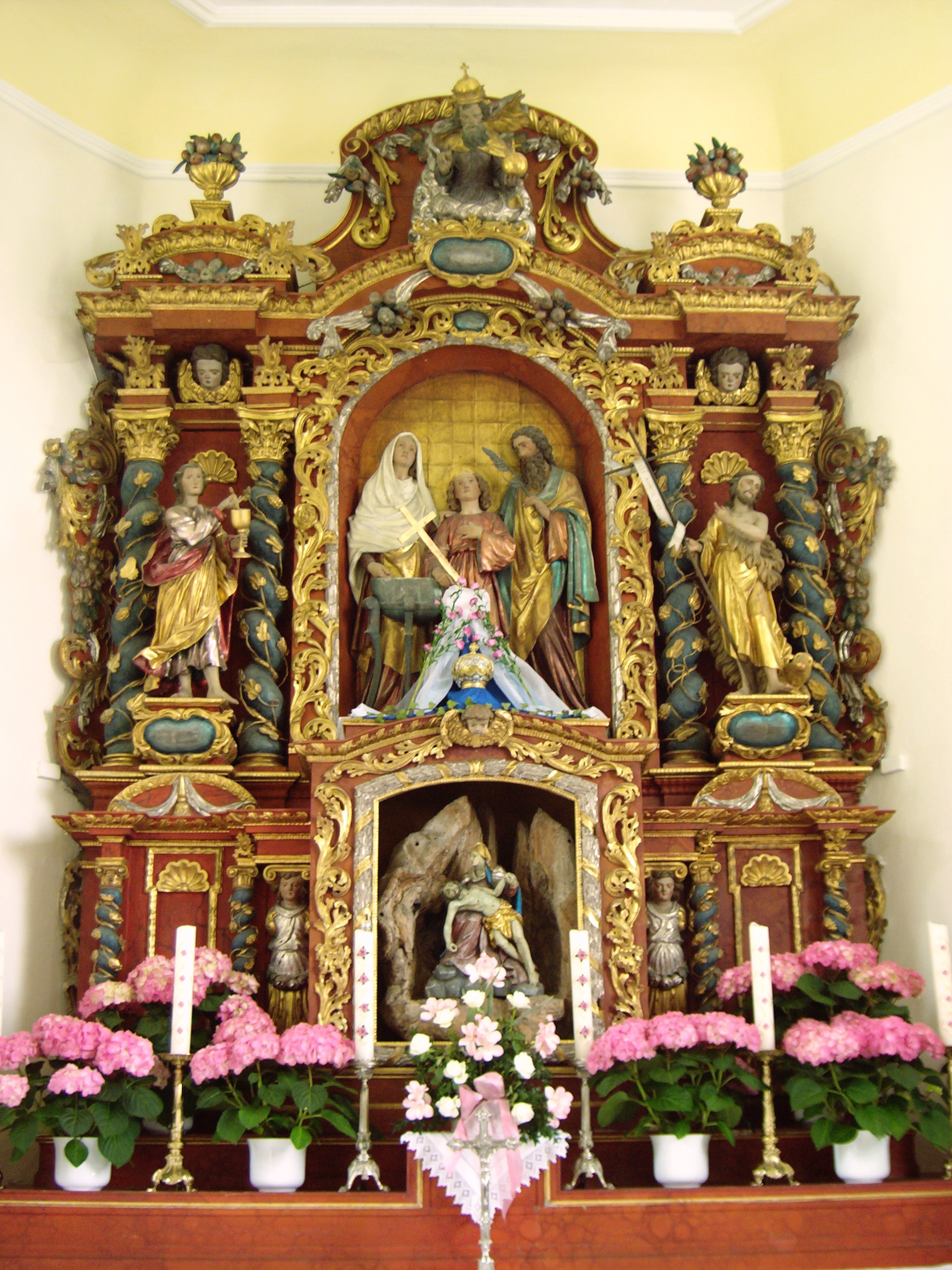 Altar der Wallfahrtskirche Maria Stock mit Kopie des 2011 wieder aufgetauchten Gnadenbilds, Fuchstal, Germany